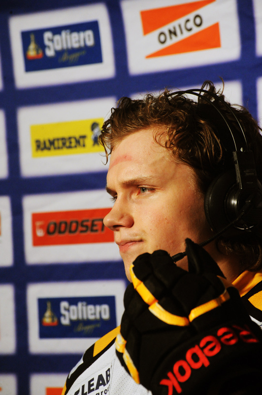 Petter Emanuelsson under en intervju 2013.